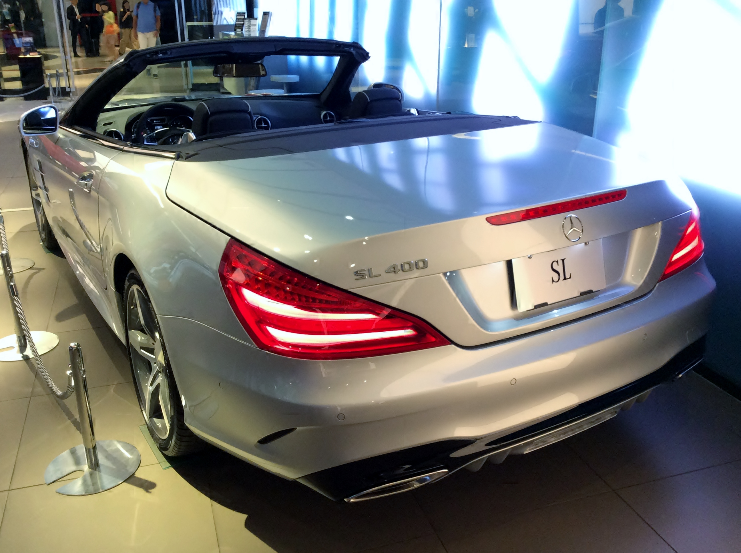 R231型メルセデス・ベンツ・SL400をリアから撮影。